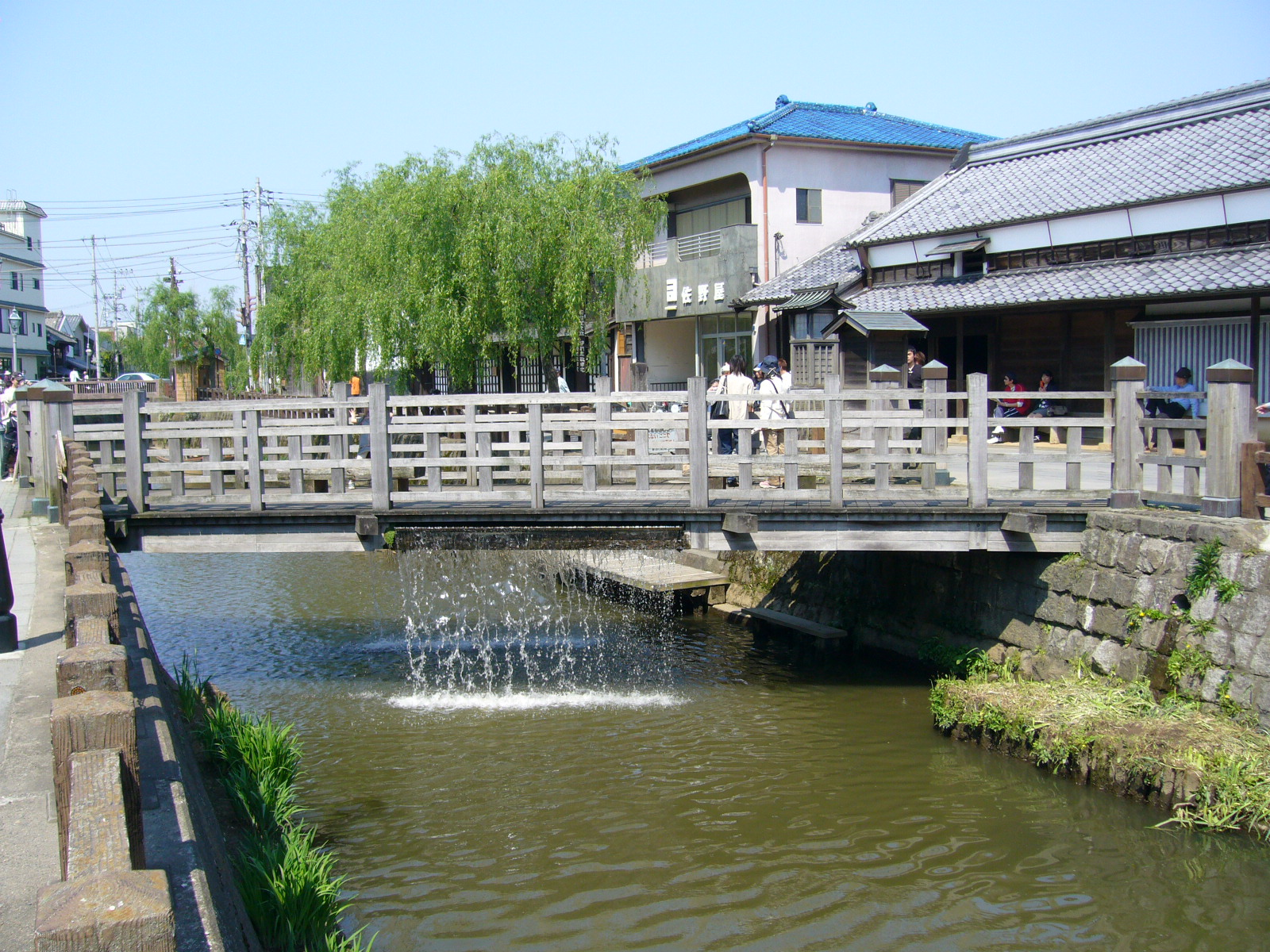 toyohashi-bridge,katori-city,japan.JPG